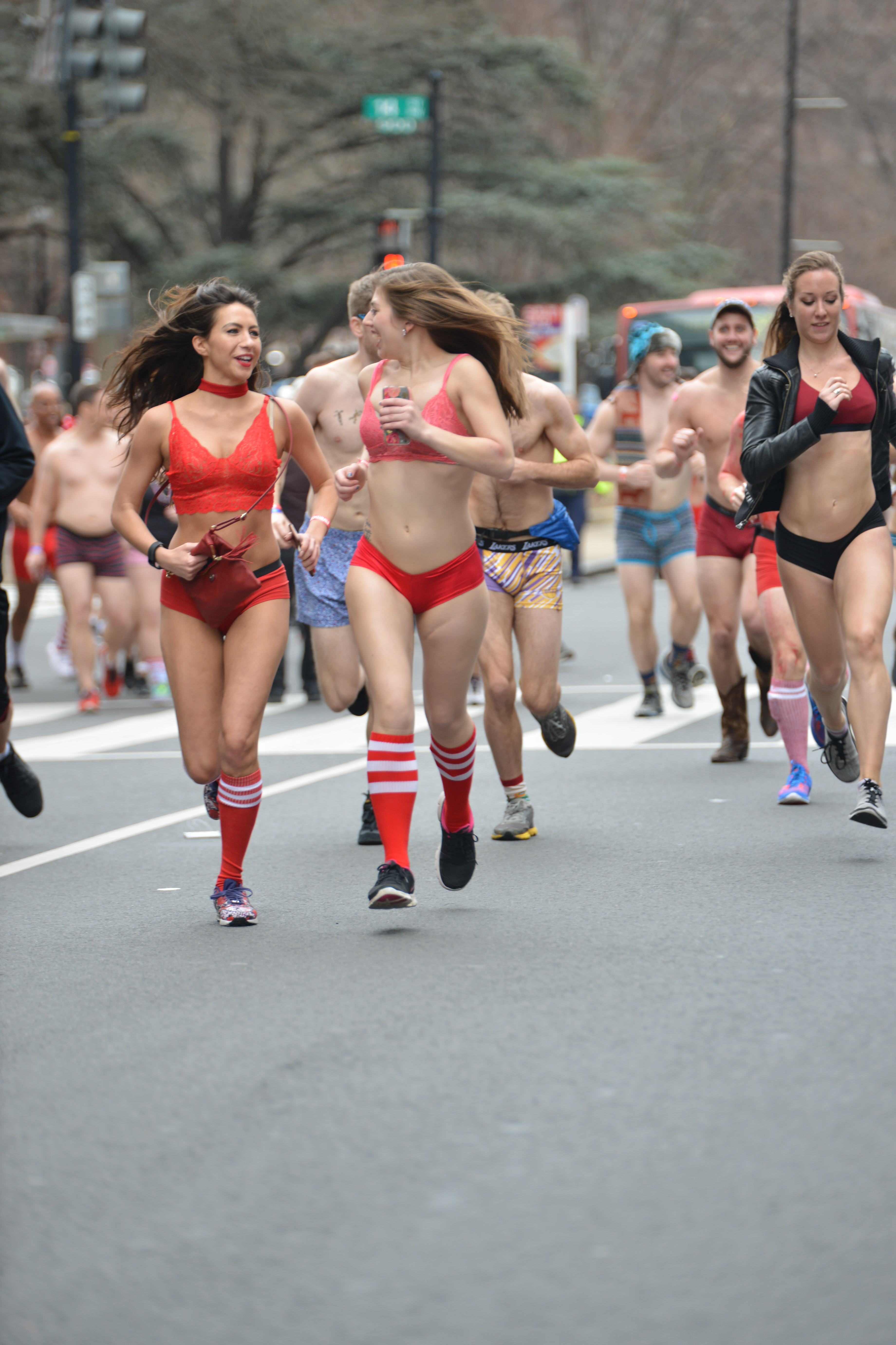 Cupid's Undie Run DC 2017